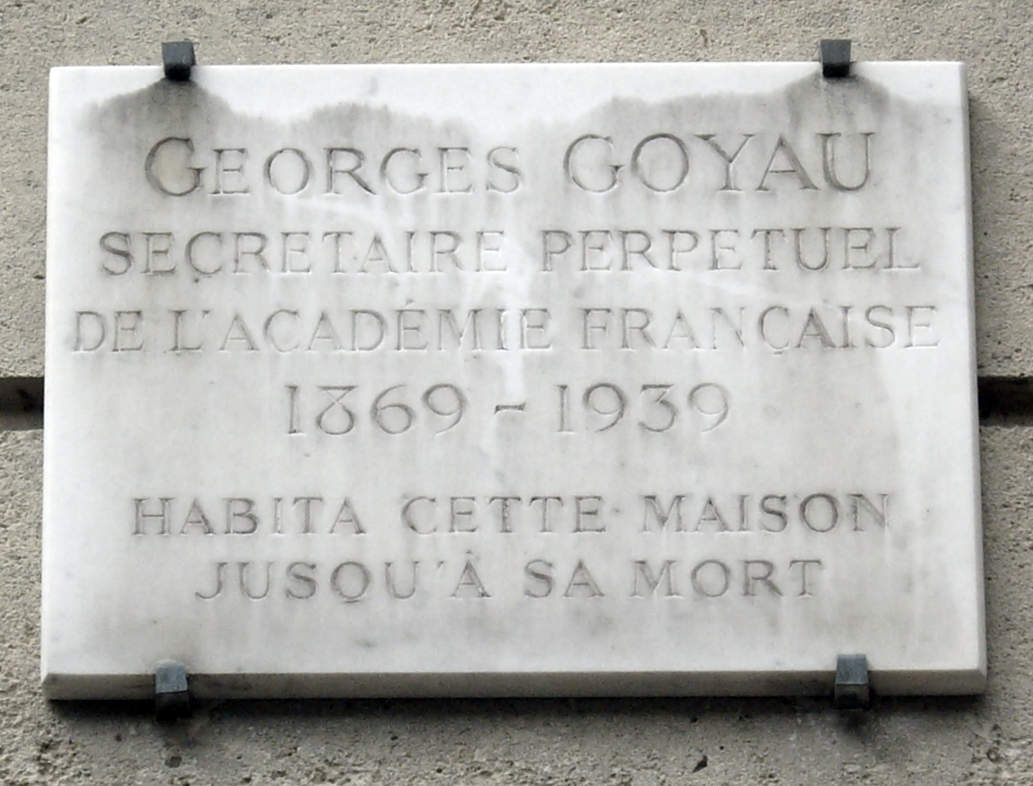 Plaque apposée au n° 20 bis de la rue Boissière, Paris 16e, où habita l'historien Georges Goyau (1869-1939) jusqu'à sa mort en 1939.